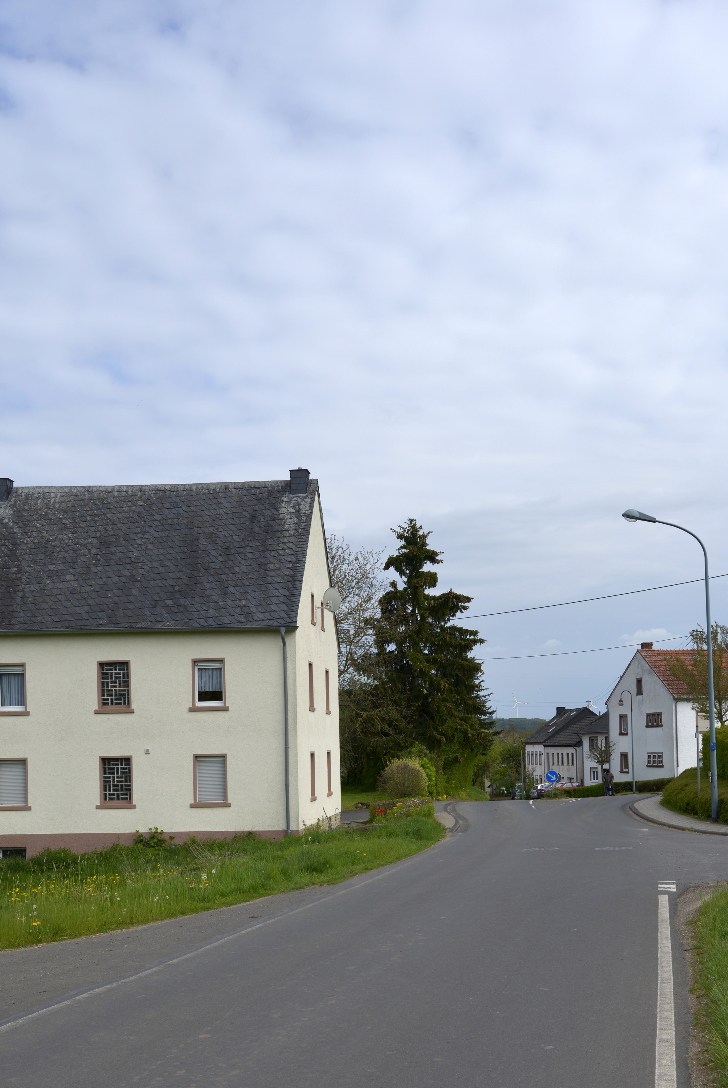 Leere ohne das Naturdenkmal "Eiche beim Haus Meyer"